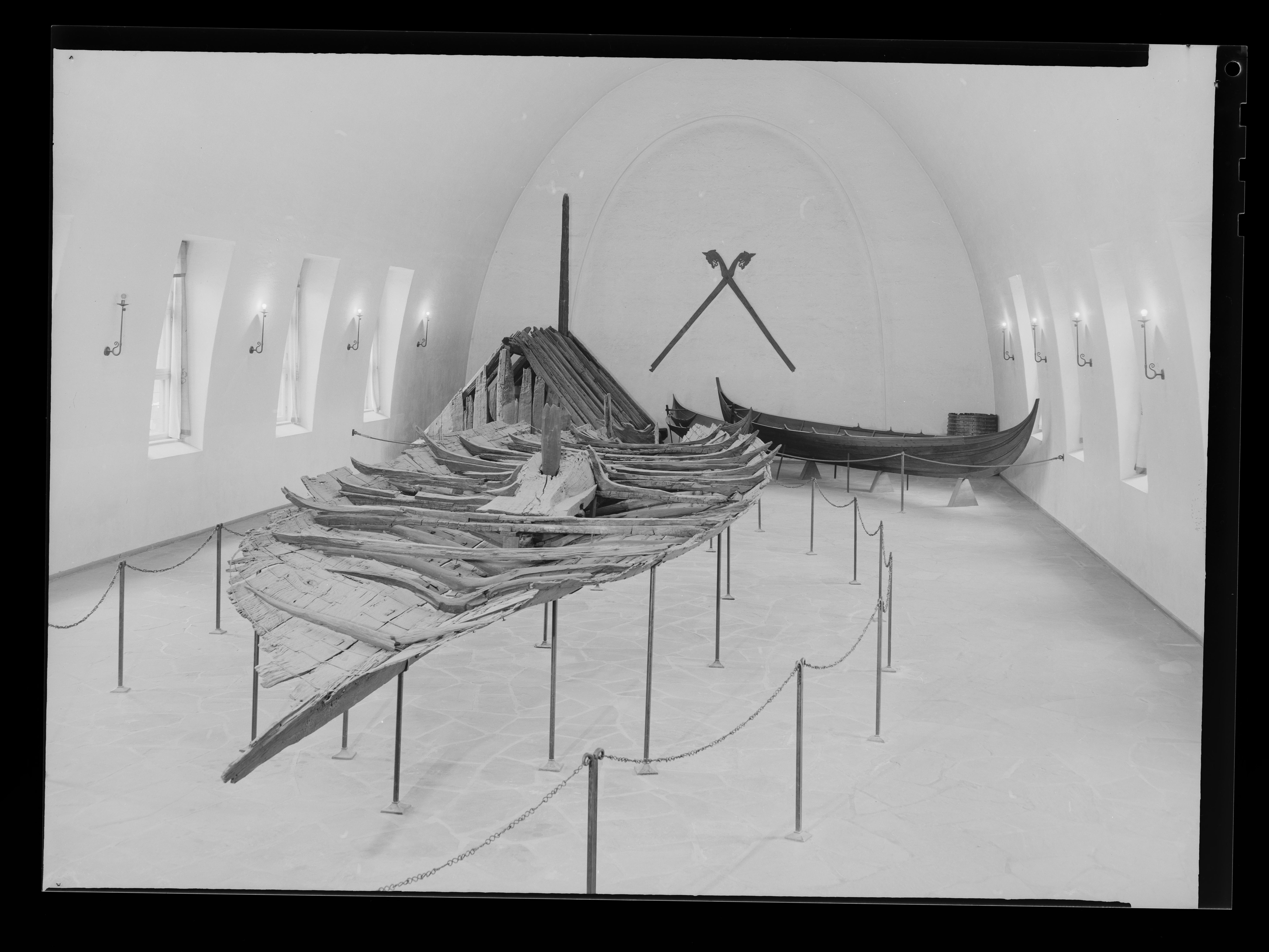 Bildet er hentet fra Nasjonalbibliotekets bildesamling Bygdøynes,Oslo, Oslo, Oslo